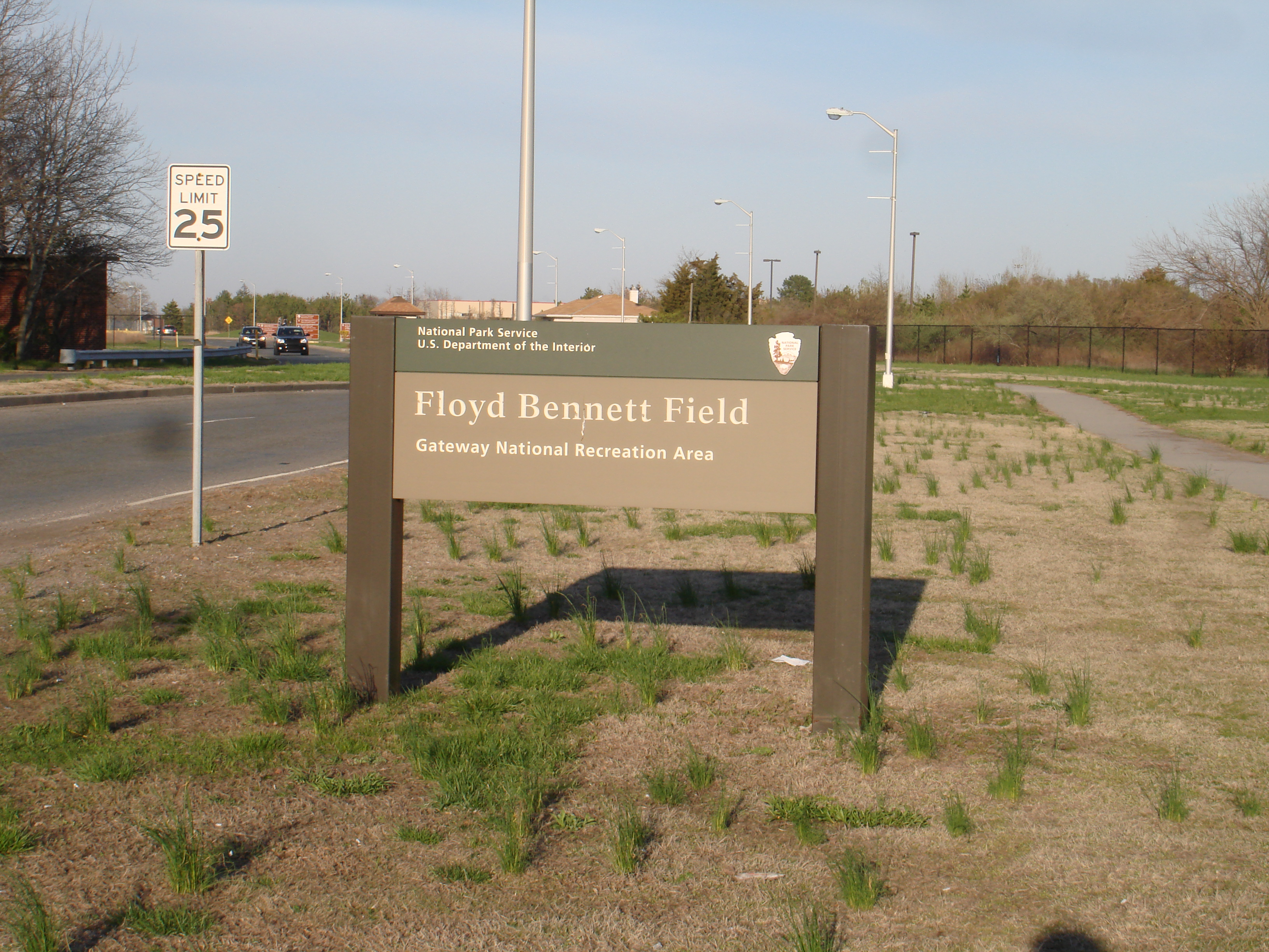 Floyd Bennett Field - 3